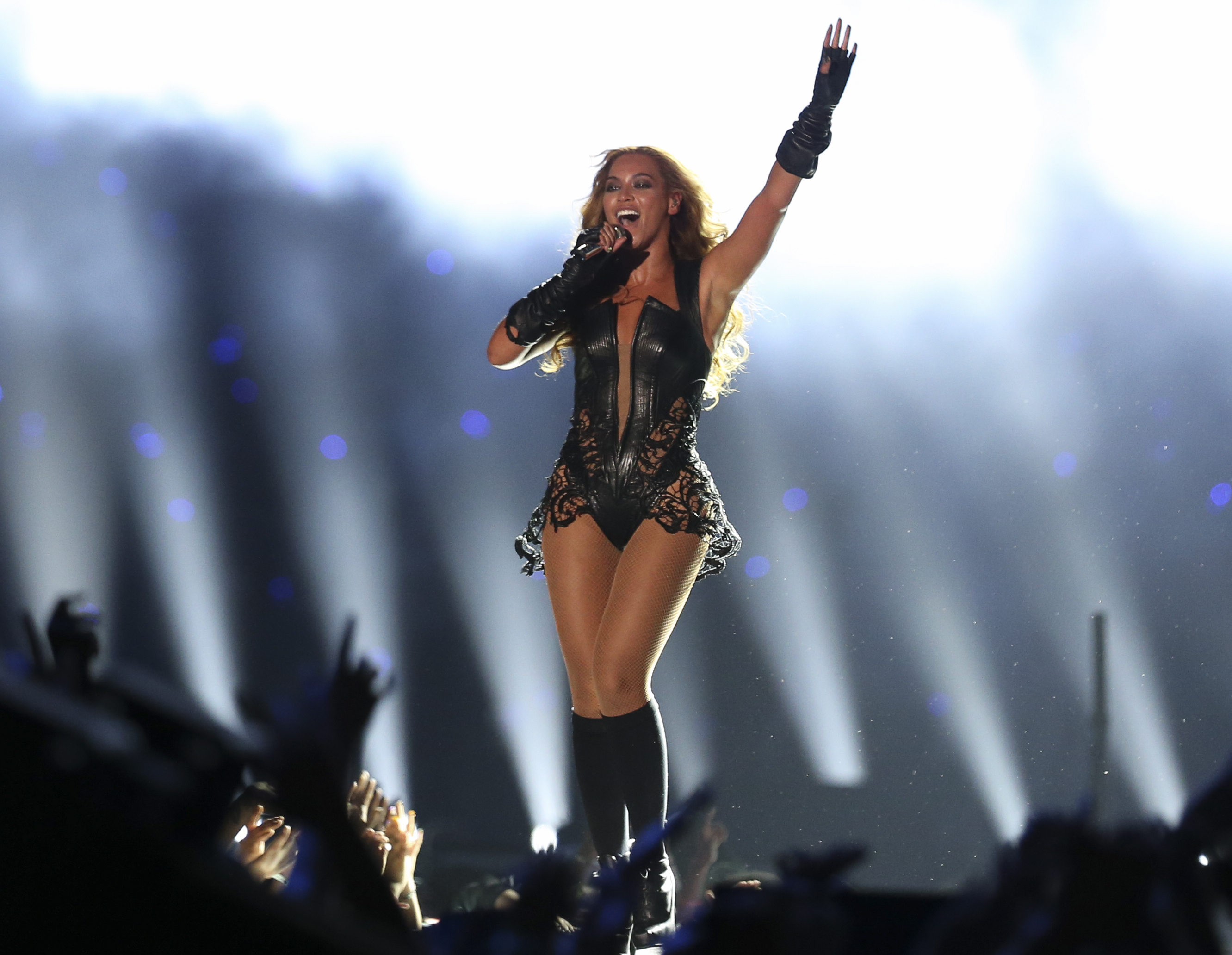 DW2Q0758